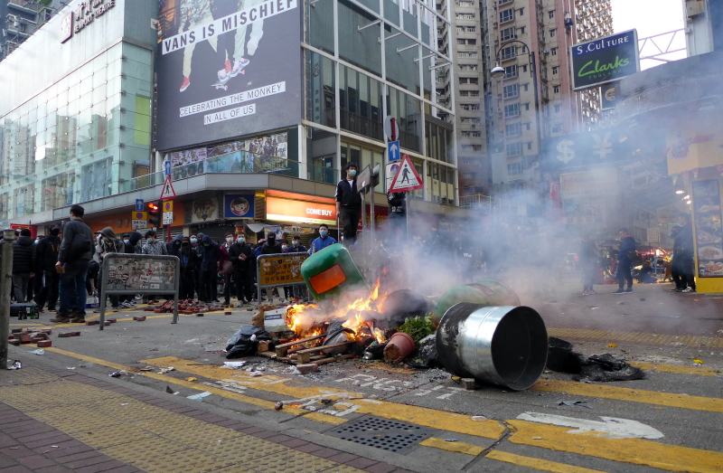 Mong Kok Civil unrest Fire in Soy Street